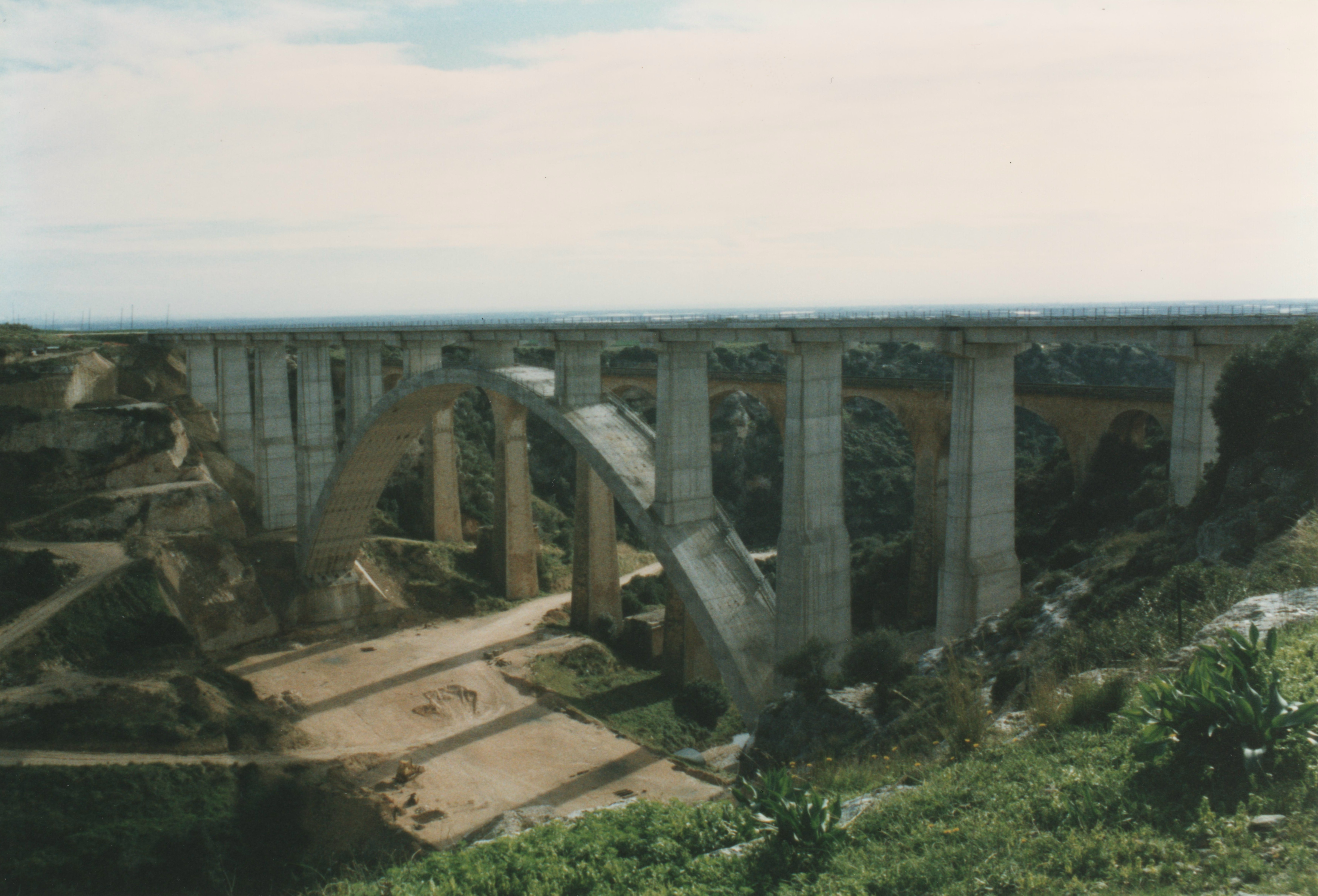 Ponte ferroviario Santa Lucia 3, Castellaneta, Taranto, Italia. Ponte in cemento armato, progettato negli anni '90, entrato in esercizio nel 2000. Doppio binario.